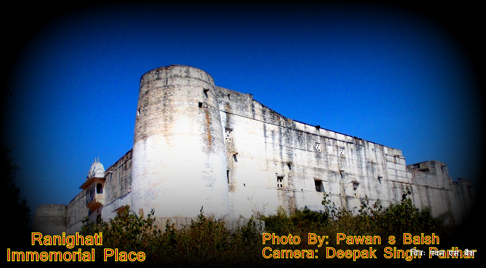 Ranighti is the famous historical place situated on the Narwar gwalior route. Ranighti is known as the birthplace of king nala.